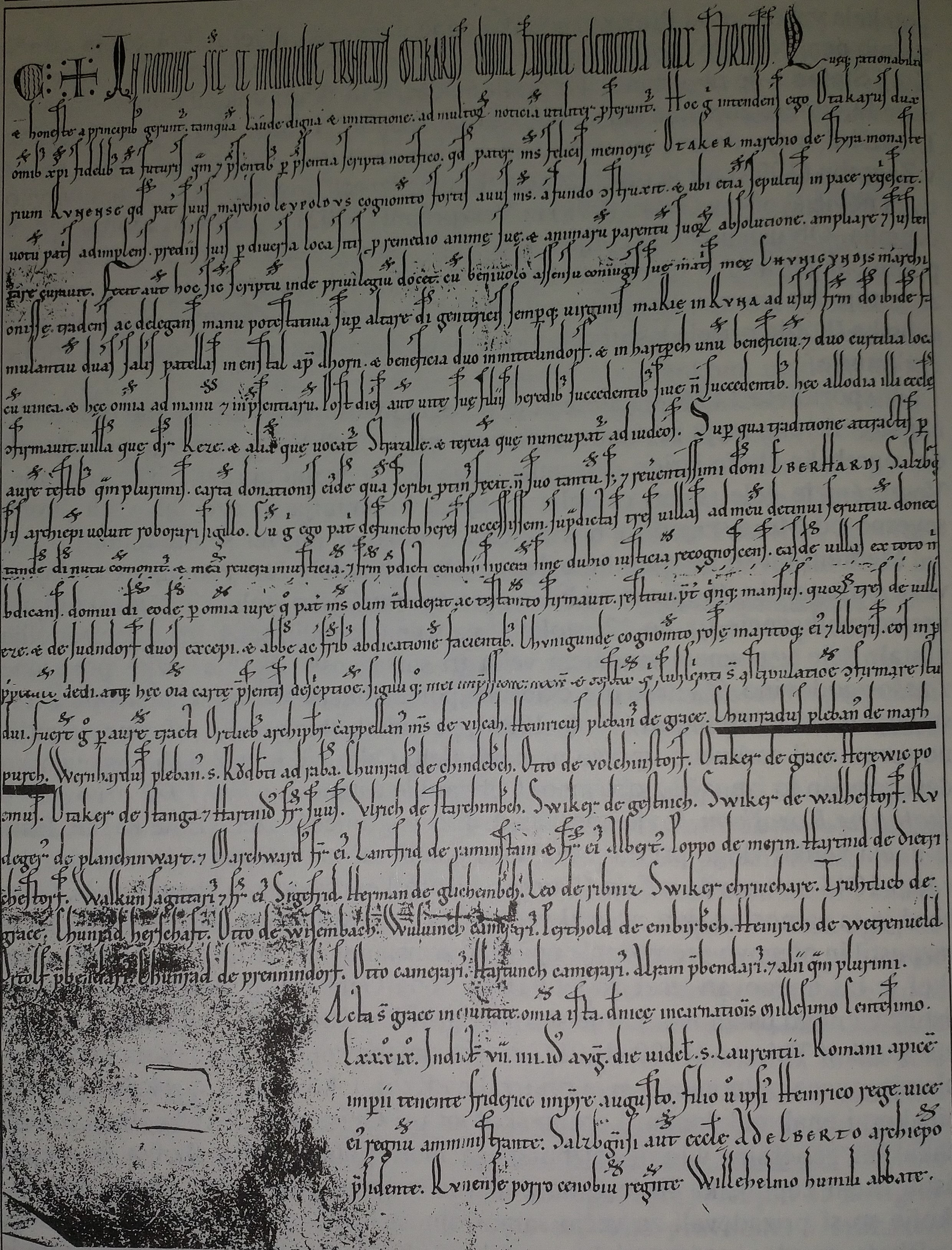 Najstarejša omemba mariborske župnije z 10. avgusta 1189 (pergamentna listina).